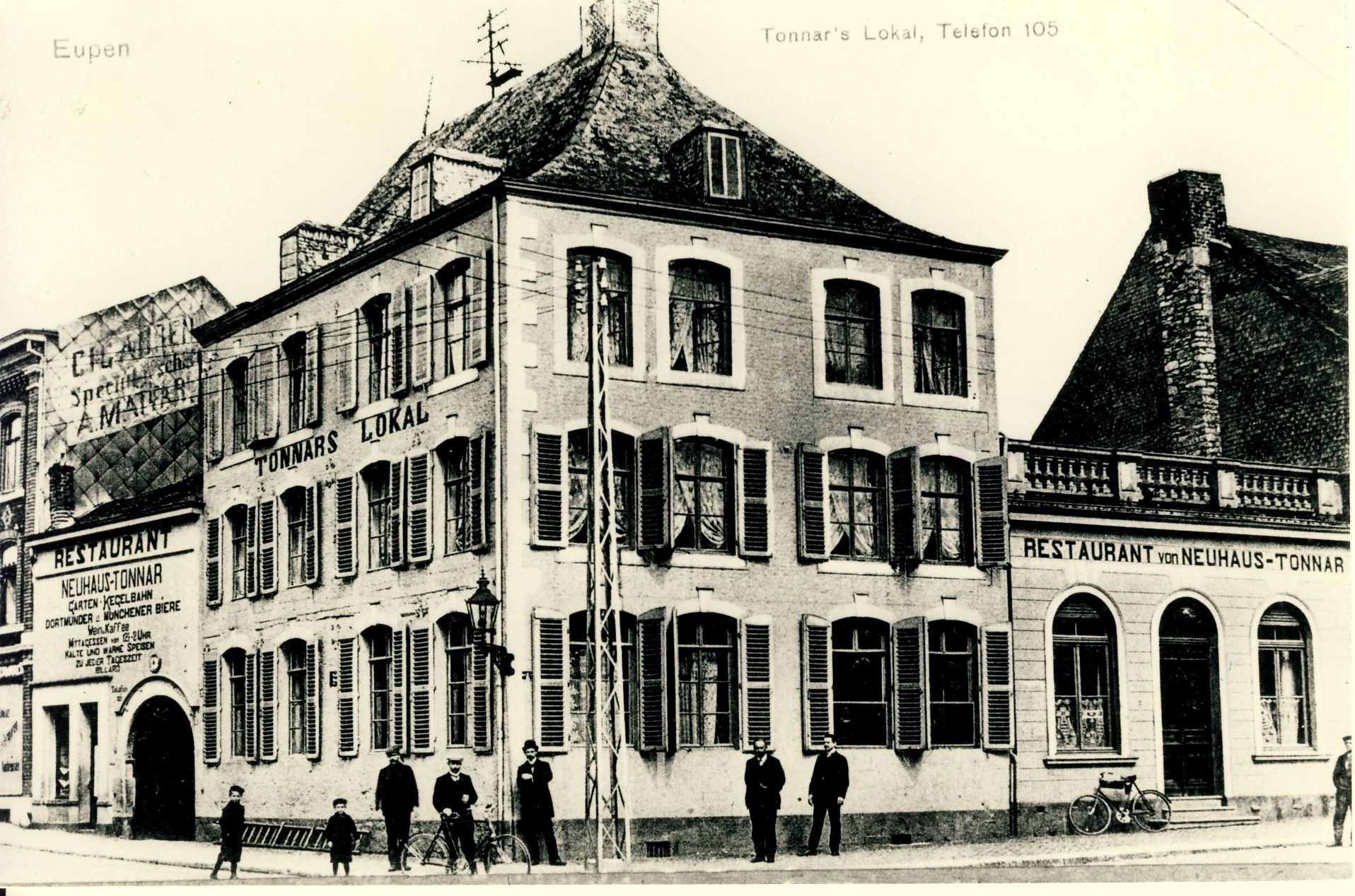 Scan einer alten Postkarte kurz nach 1900 mit Ansicht des Lokal von August Tonnar in Eupen